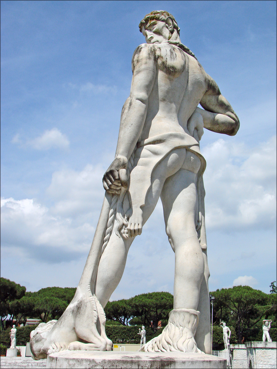 Statue du stade des marbres Une statue qui ressemble à Hercule avec sa massue mais avec un "lionceau de Némée " qui semble bien peu féroce :-) ____________ Le Foro Italico, appelé dans les années 30, Foro Mussolini, est un grand ensemble de bâtiments et d'équipements sportifs. Sa construction a débuté à l'époque fasciste sous la direction de l'architecte Enrico Del Dubbio. Le Foro a été inauguré en 1932. A l'entrée, un obélisque en marbre dédié à Mussolini a été érigé. Le stade des marbres est l'équipement le plus célèbre avec ses 60 statues d'athlètes à l'antique, placées au-dessus des gradins et offertes par les villes et provinces d'Italie. A l'entrée, se trouvait l'Académie d"éducation physique, constituée de deux corps de bâtiments rouges, symétriques et reliés par une loggia. Les locaux sont occupés aujourd'hui par le comité olympique italien. A proximité, un stade olympique a été construit pour les jeux de 1960 puis agrandi pour la coupe du monde de 1990.